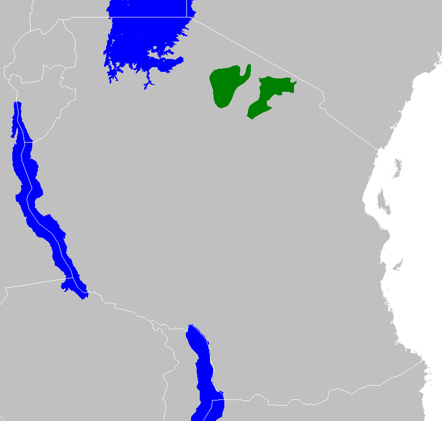 Serengeti volcanic grasslands ecoregion map